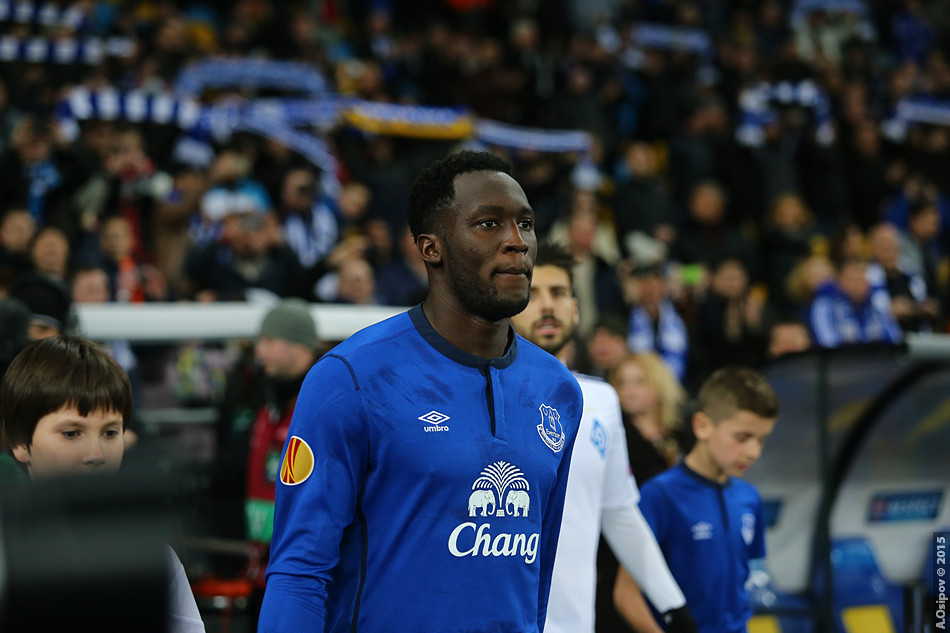 Romelu Lukaku entering the stadium